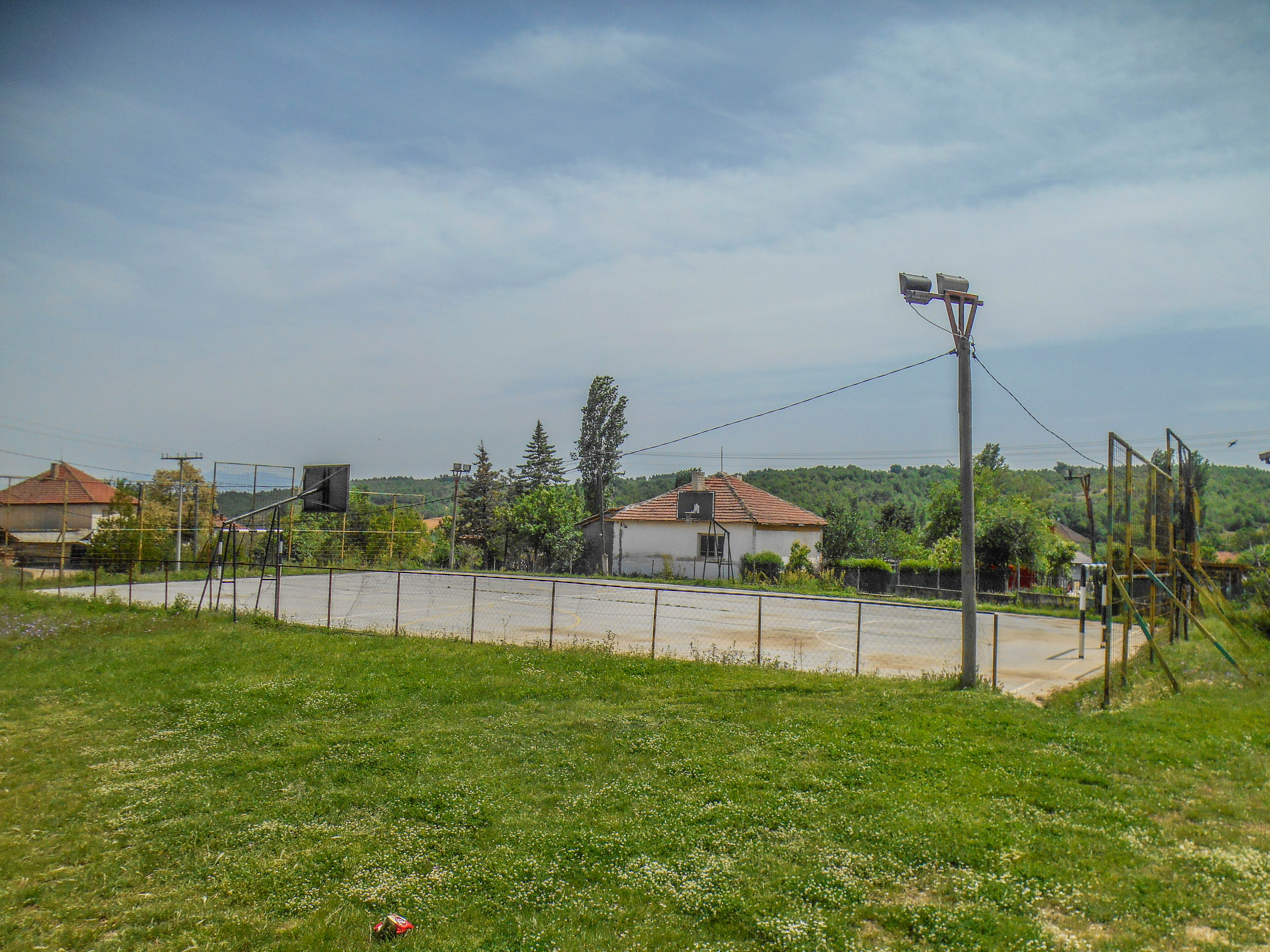 Спортско игралиште